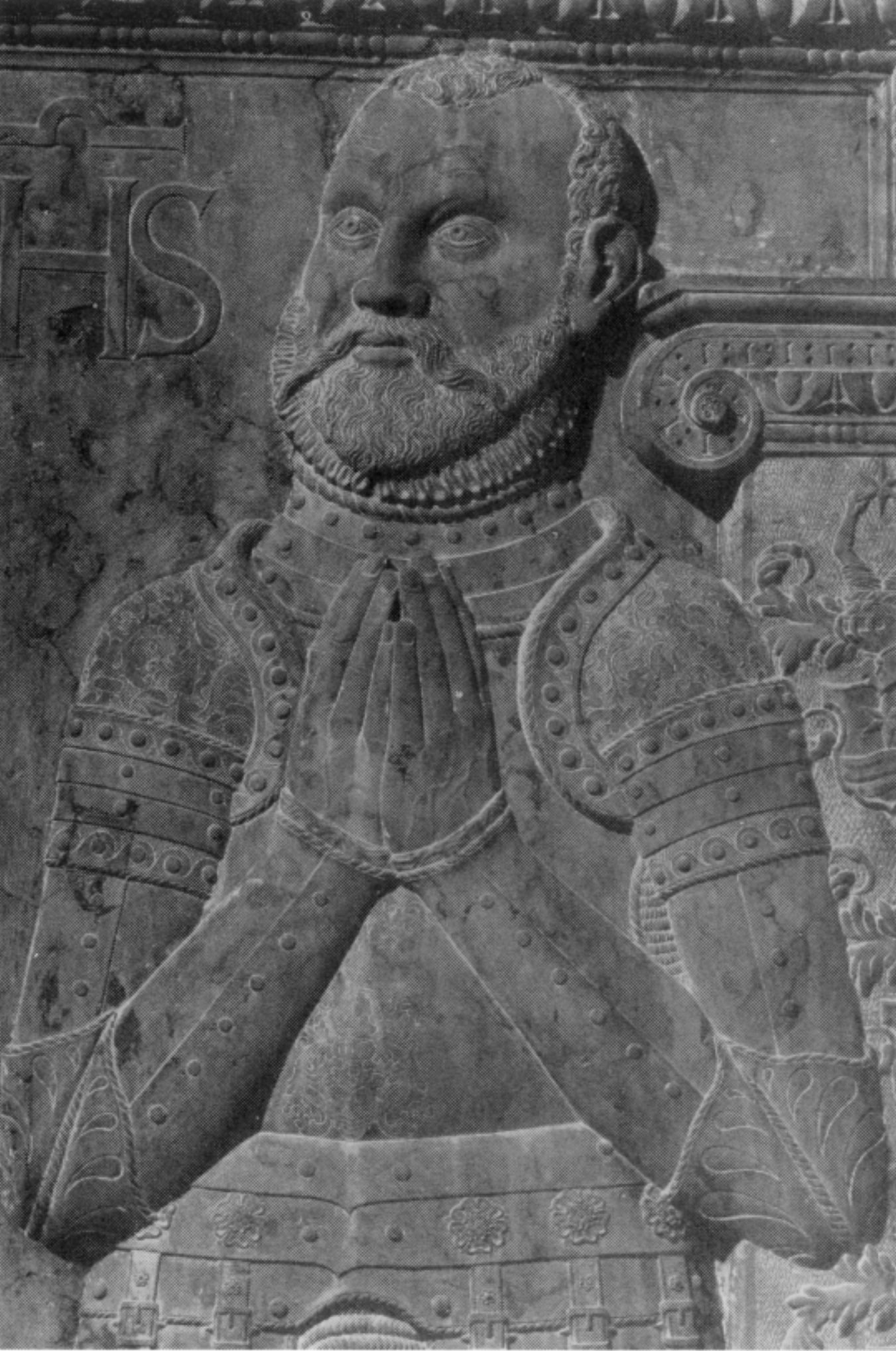 Ove Juel til Keldgaard, lensherre Akershus, relieff fra gravsted. Avskjæring: Hofte